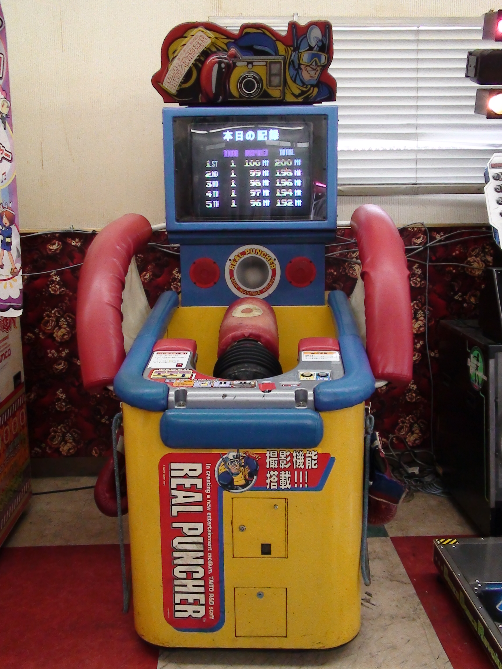 リアルパンチャーの画像